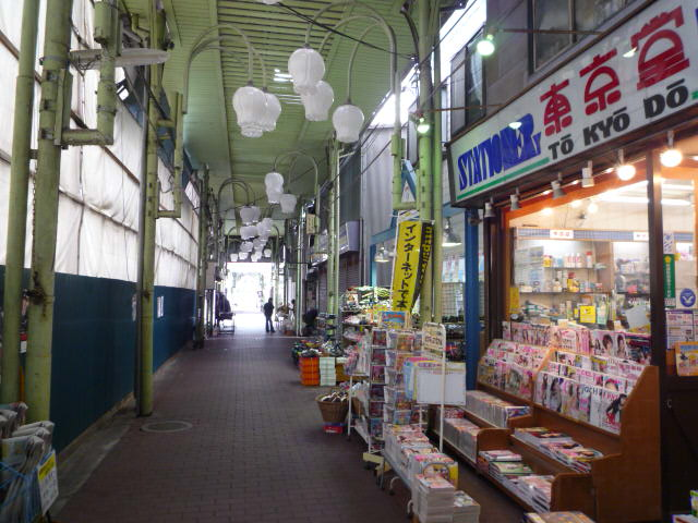 田浦の仲通り商店街の画像。